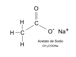 Acetato de Sodio Molecula